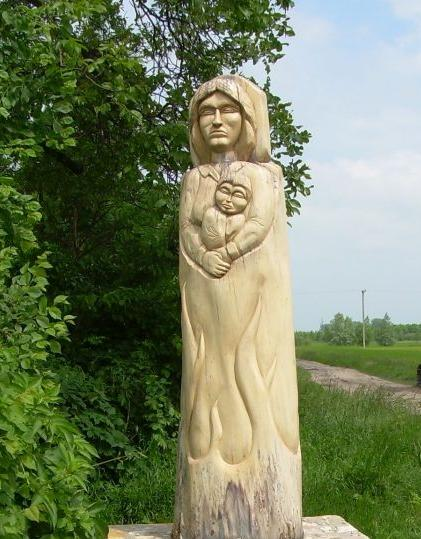 Csiszár Gyula munkája